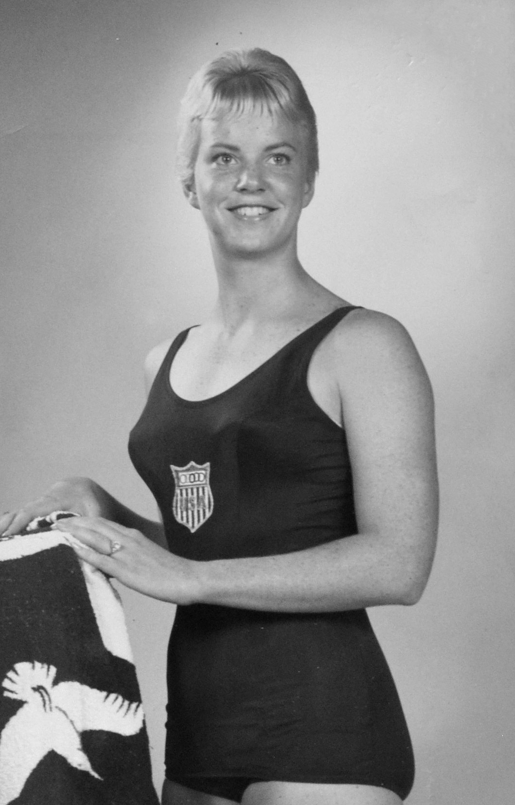 Lynn Burke